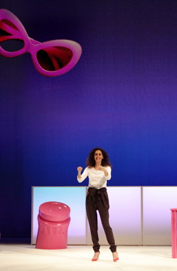 Marco Rampoldi